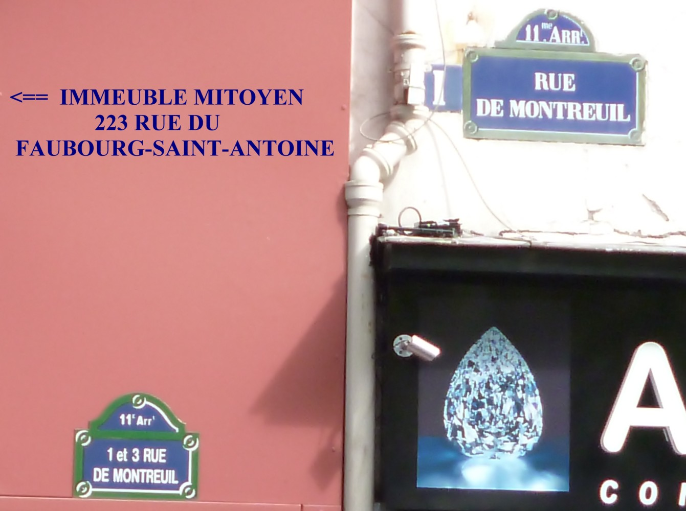 Curieusement les premiers numéros de la rue de Montreuil se trouvent en fin de la rue du Faubourg-Saint-Antoine, la rue continuant au delà de la rue Faidherbe.